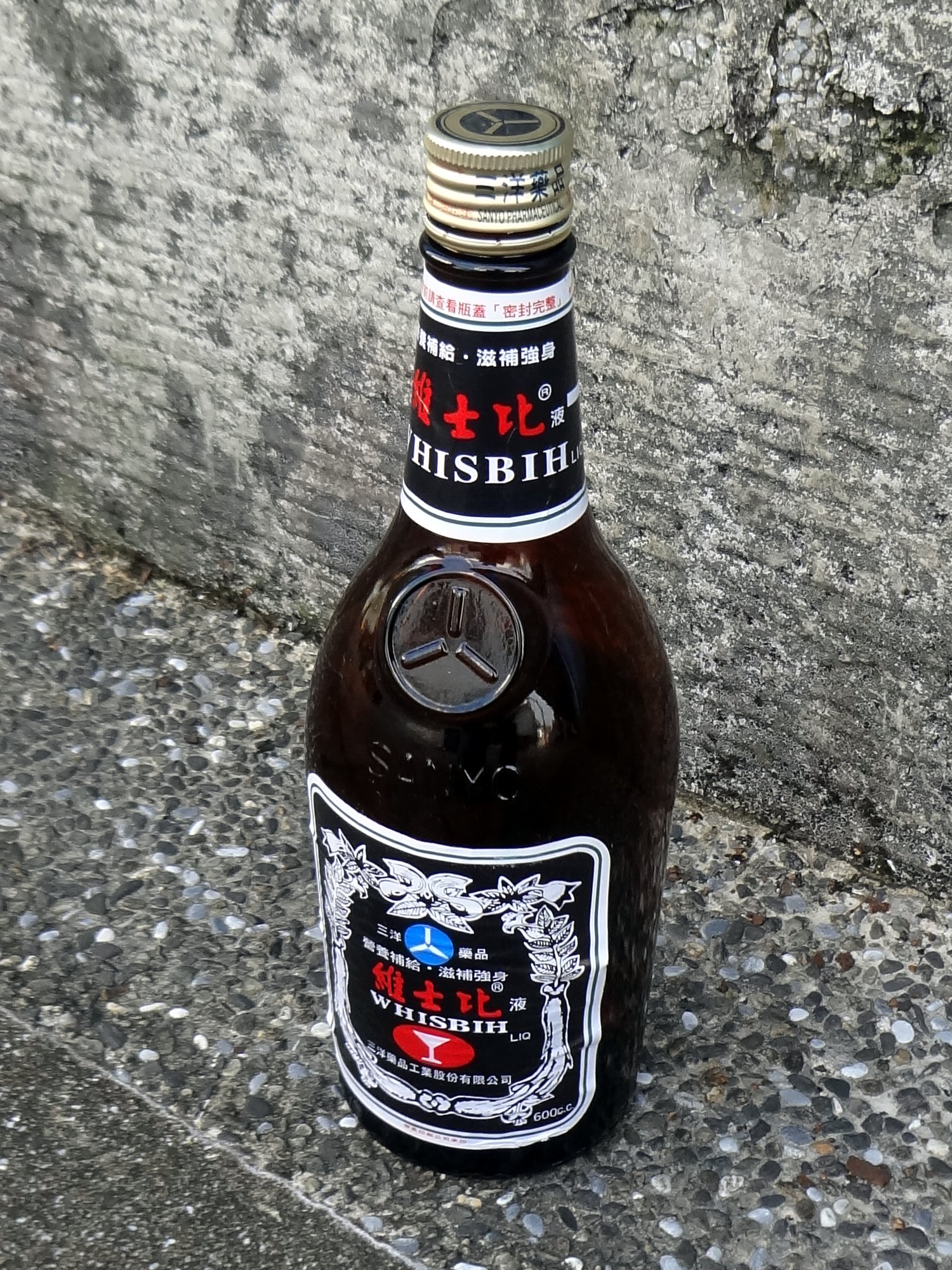 三洋藥品維士比液600cc玻璃空瓶正面。